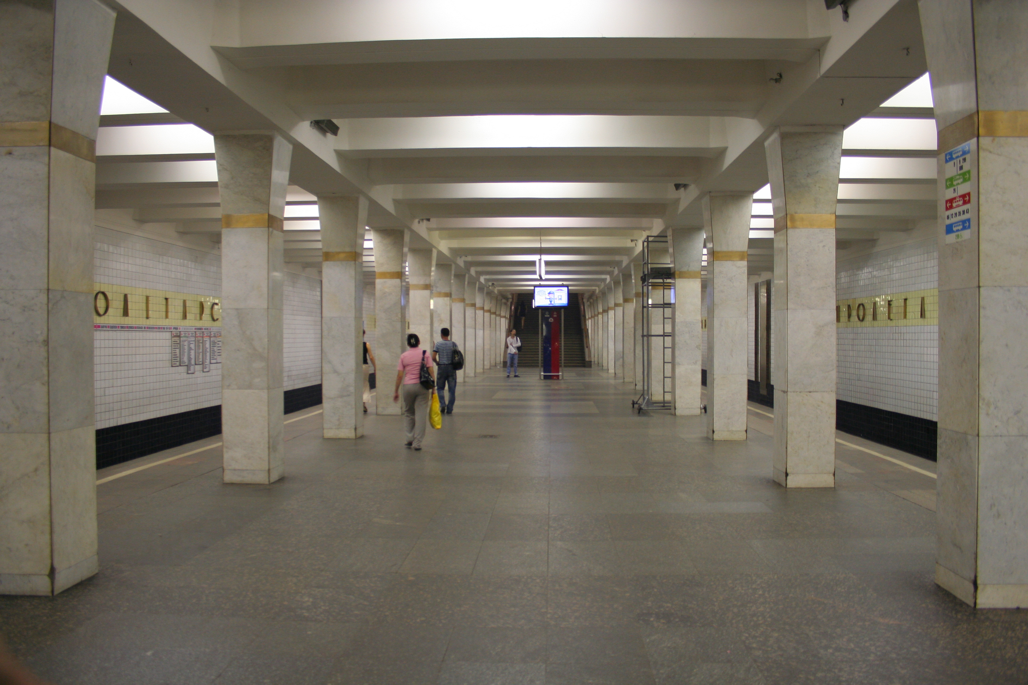 U-Bahnhof Proletarskaja der Metro Moskau.